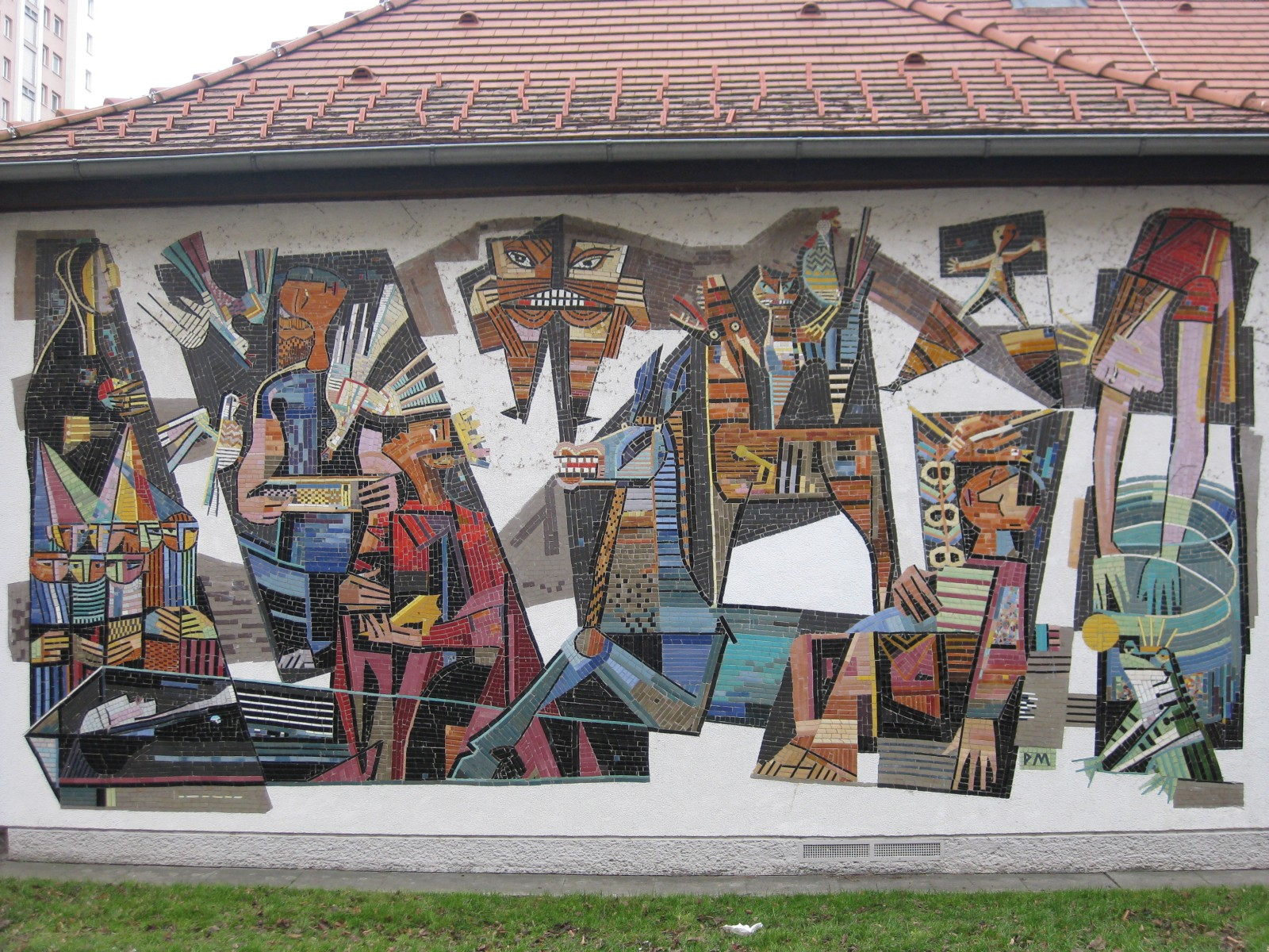 Wandmosaik Märchenzug von Paul Meissner aus dem Jahre 1957, Kindergarten im Theodor Körner-Hof, Reinprechtsdorfer Straße 1c, Wien-Margareten. This media shows the Vienna residential building (Gemeindebau) with the ID 103.